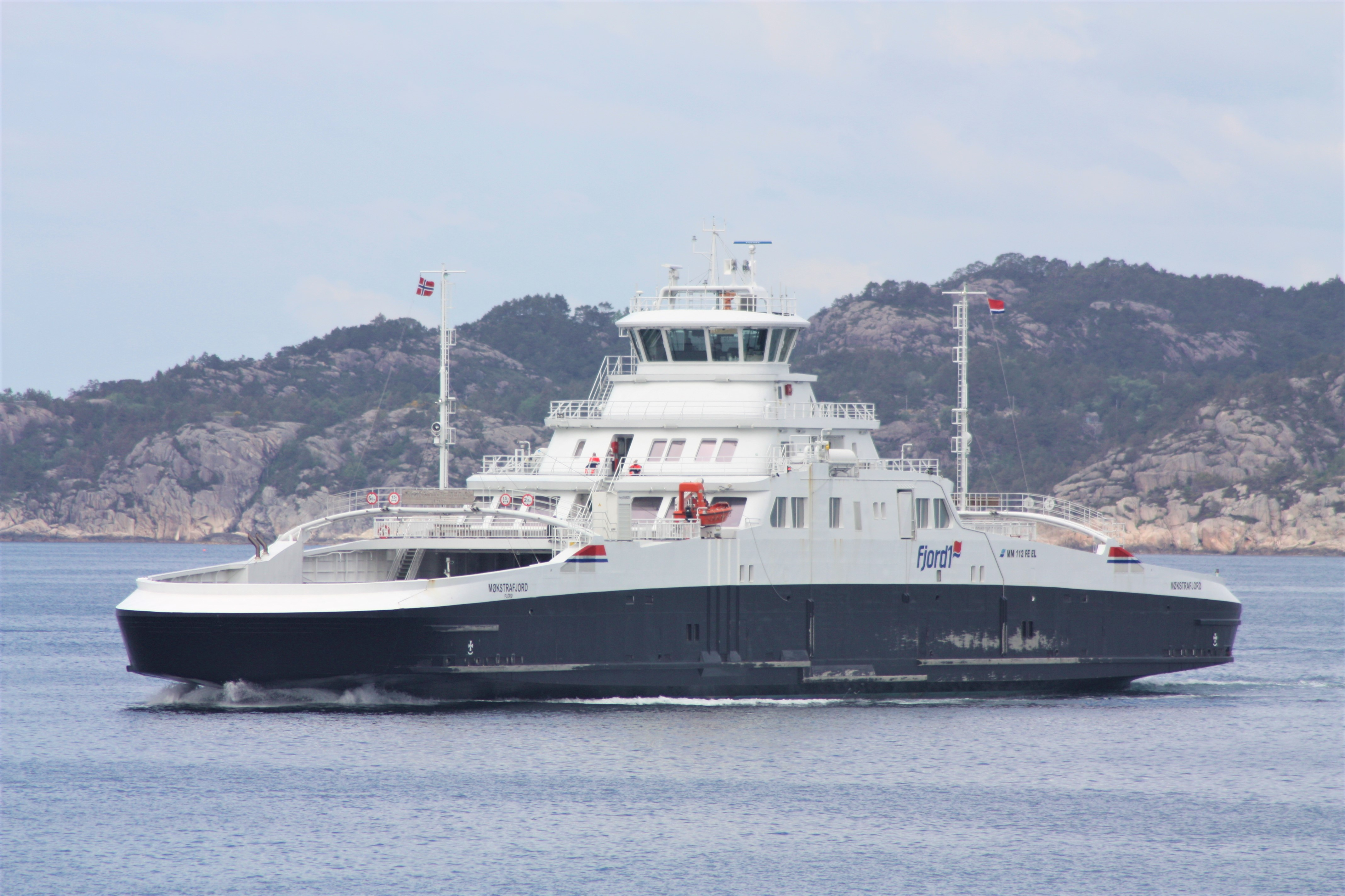 MF «Møkstrafjord» i Korsfjorden